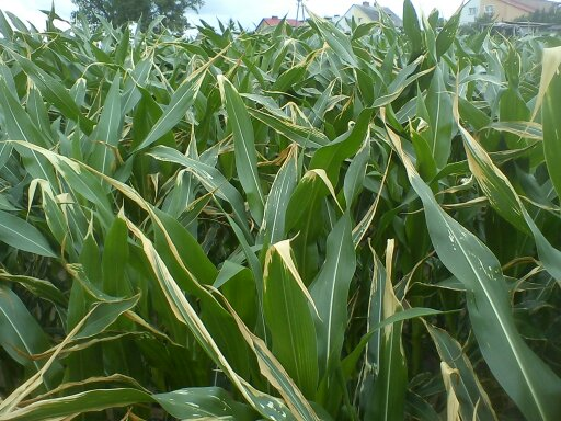 Uszkodzenia liści kukurydzy wywołane przez mocznik, który został rozsiany na mokre rośliny